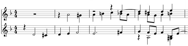 Eingangstakte des Mozart-Requiems